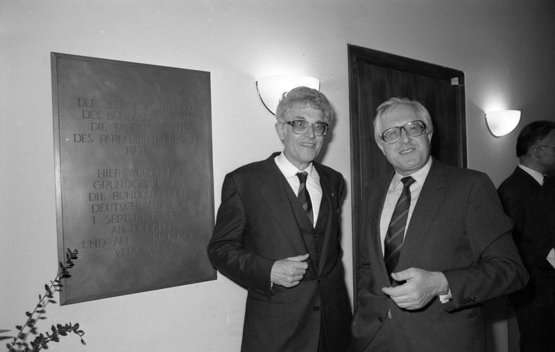 22.9.1988 Festakt im Plenarsaal des Bundesrates anläßlich des 40-Jahrestages der 1. Sitzung des Parlamentarischen Rates an gleicher Stelle. Eine von Bundesrat-Präsident, Ministerpräsident Dr. Bernhard Vogel enthüllte Gedenktafel erinnert an dieses historische Datum. Festredner: Prof. Dr. Rudolf Morsey